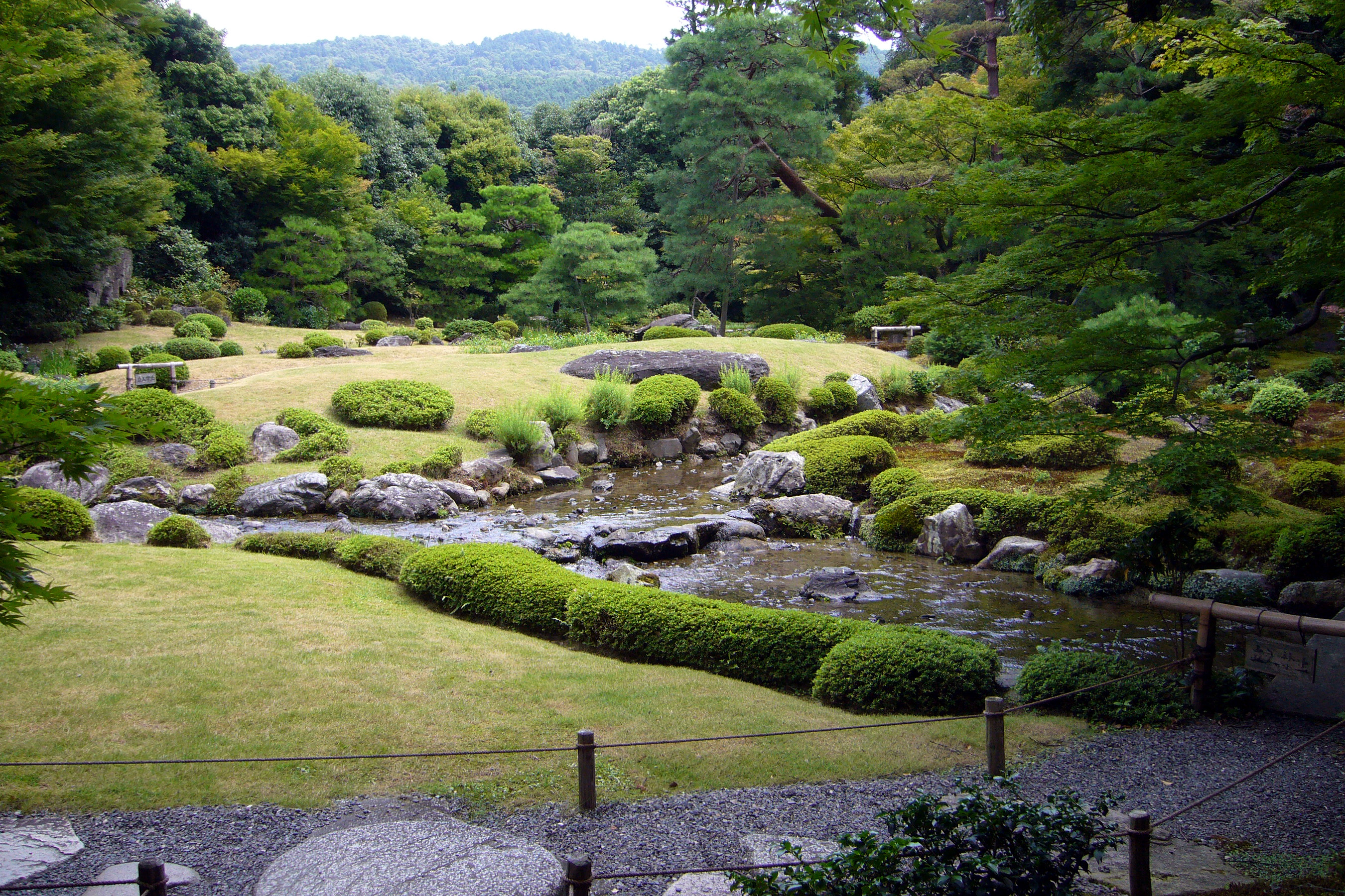 Murinan, Kyoto, Japan